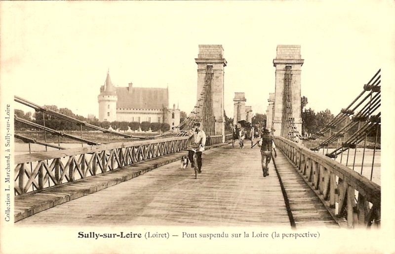 Carte postale du pont suspendu de Sully-sur-Loire, Loiret, Centre, France